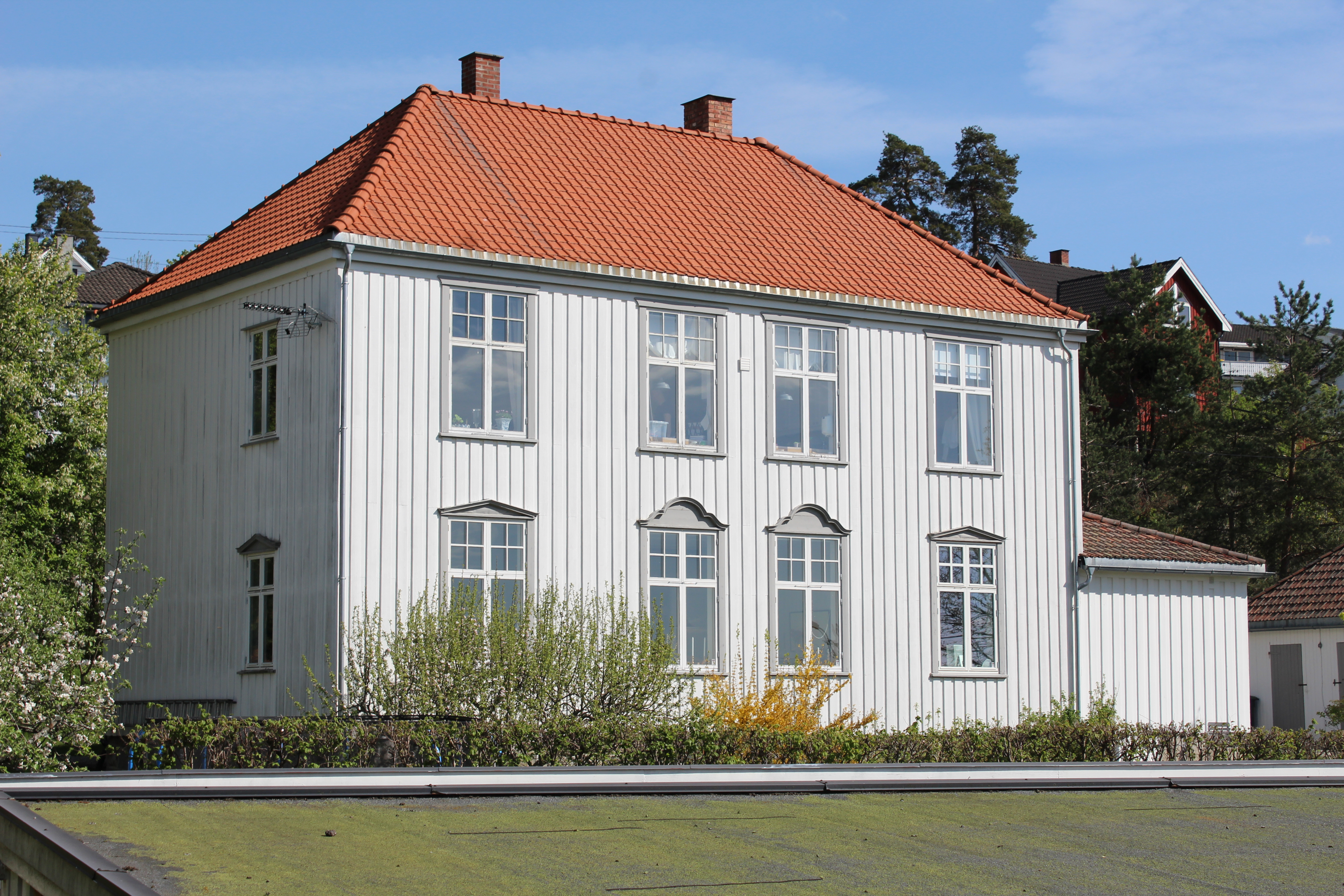 Bilde tatt av Greverud lærerbolig, som ble bygd i 1924. Bilde tatt i mai 2019.